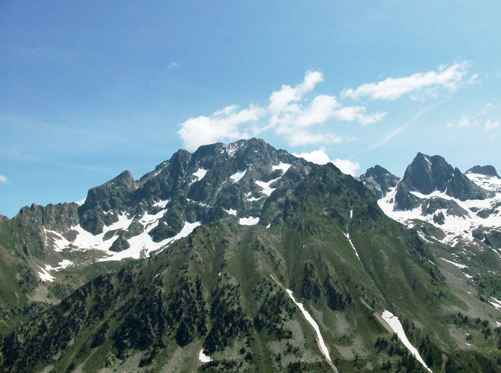 Il versante occidentale del massiccio dell'Argentera visto dal Lago Superiore di Fremamorta